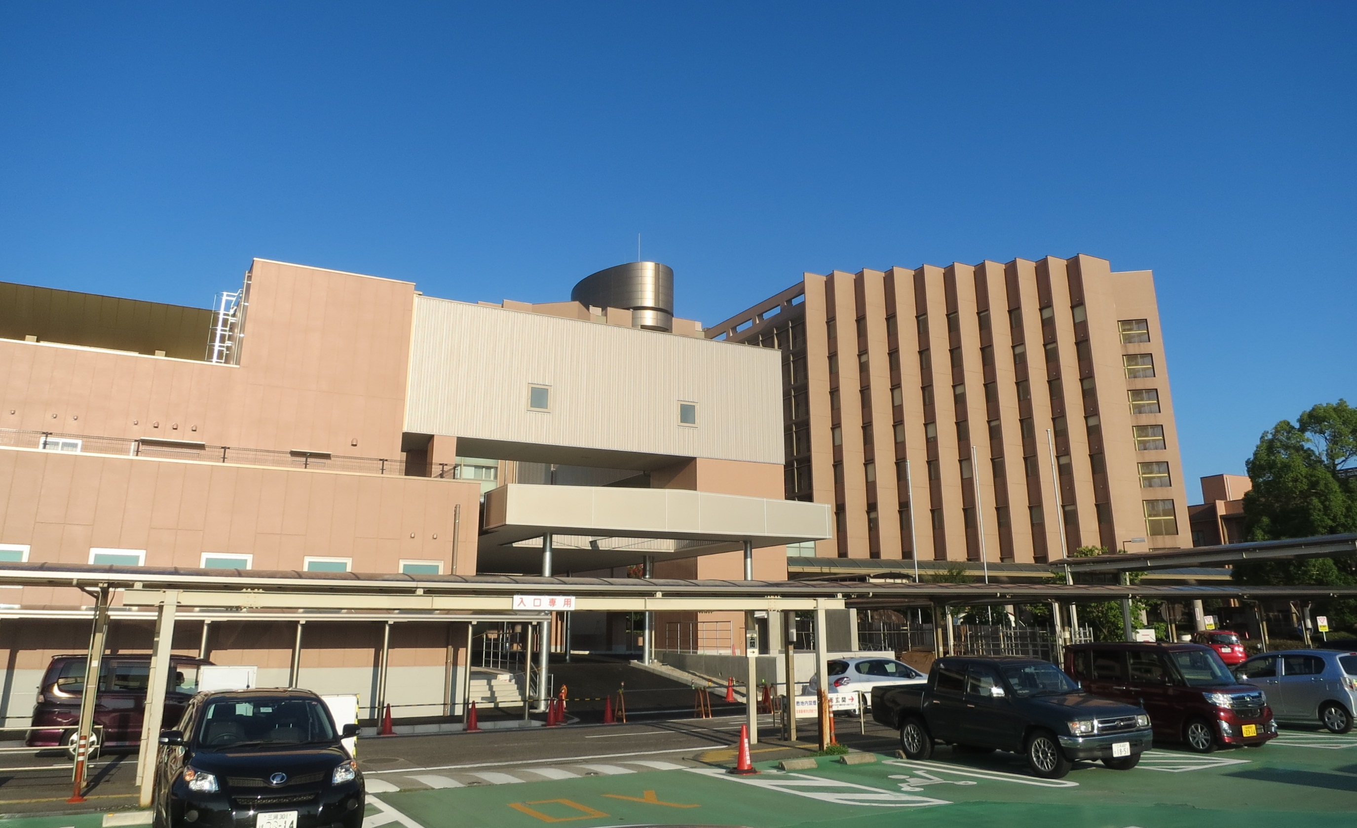 岡崎市民病院（岡崎市高隆寺町）